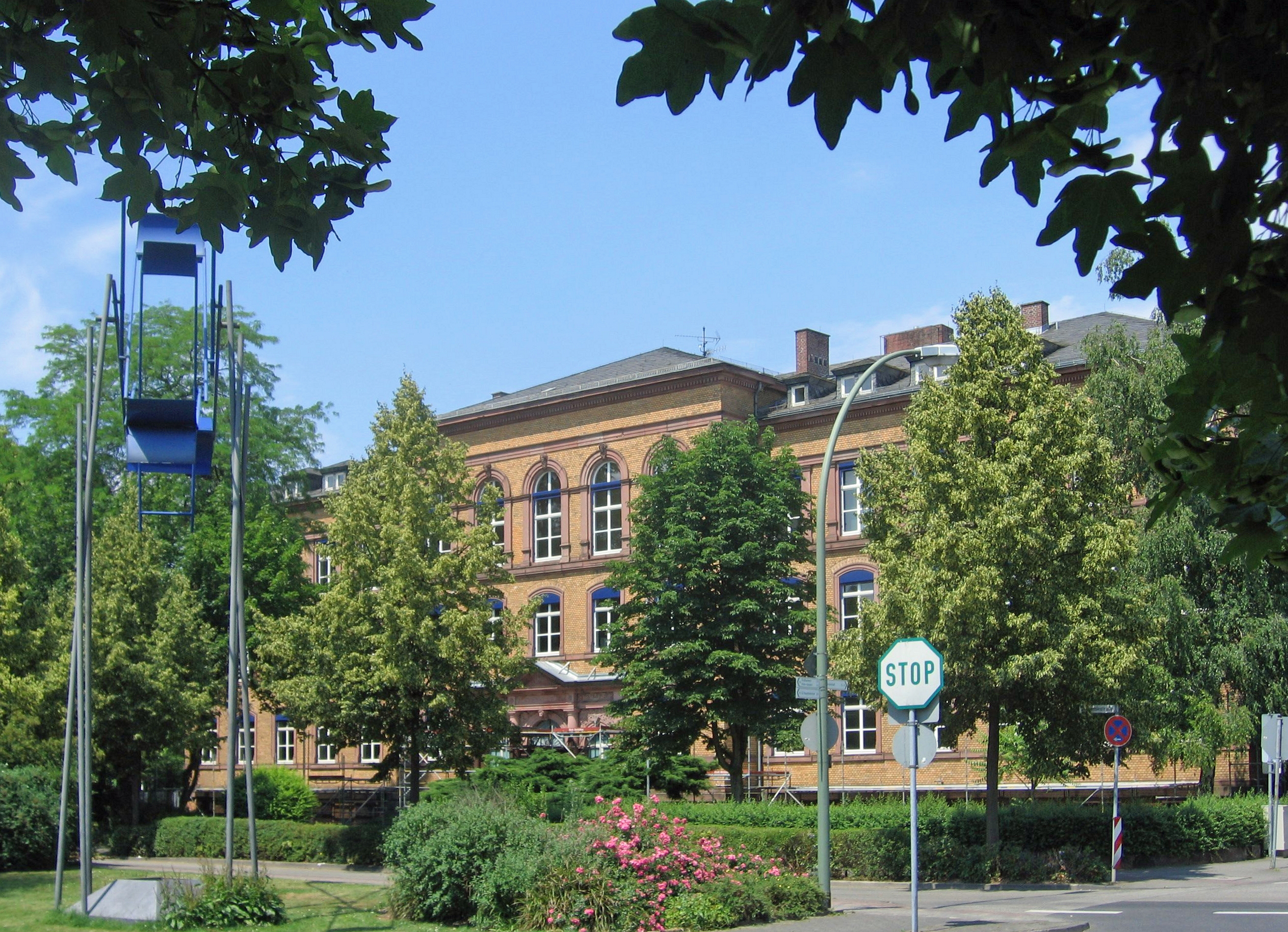 Kinetic sculpture Im Sternzeichen des Dädalus by Hans-Michael Kissel, Zeichenakademie in Hanau/Germany